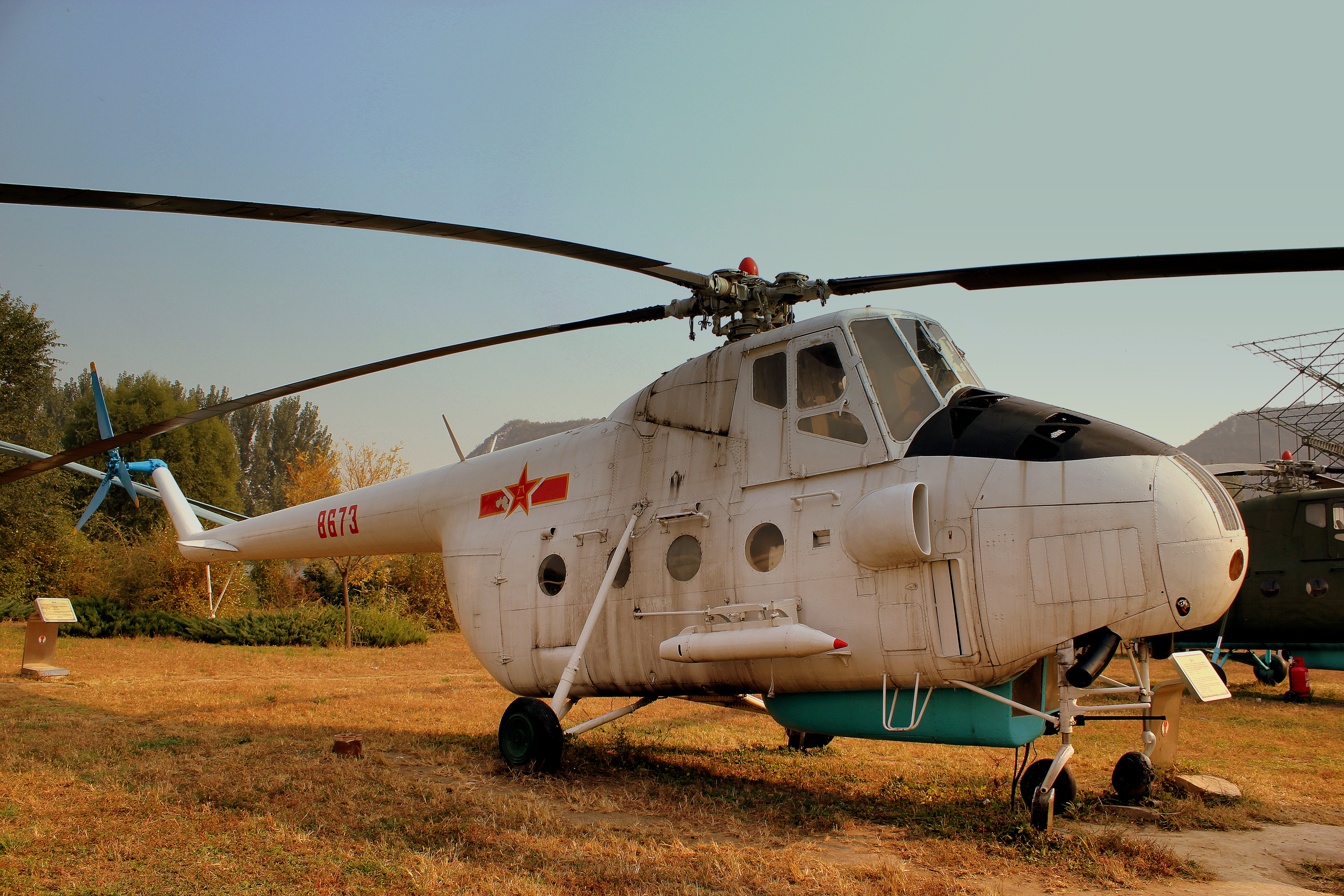 DATANSHAN CHINA AVIATION MUSEUM BEIJING OCT 2012